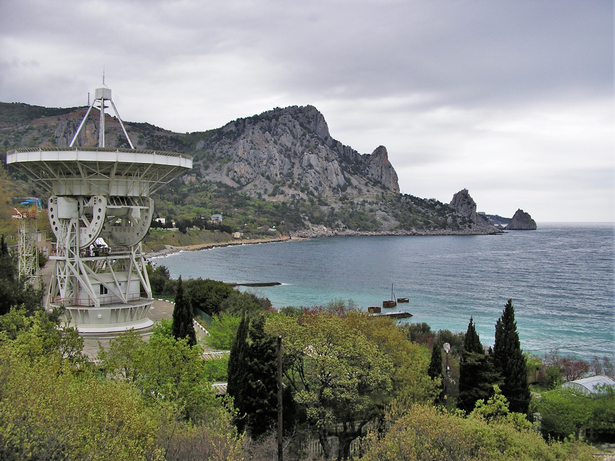 Астрофизическая обсерватория в посёлке Кацивели, Крым